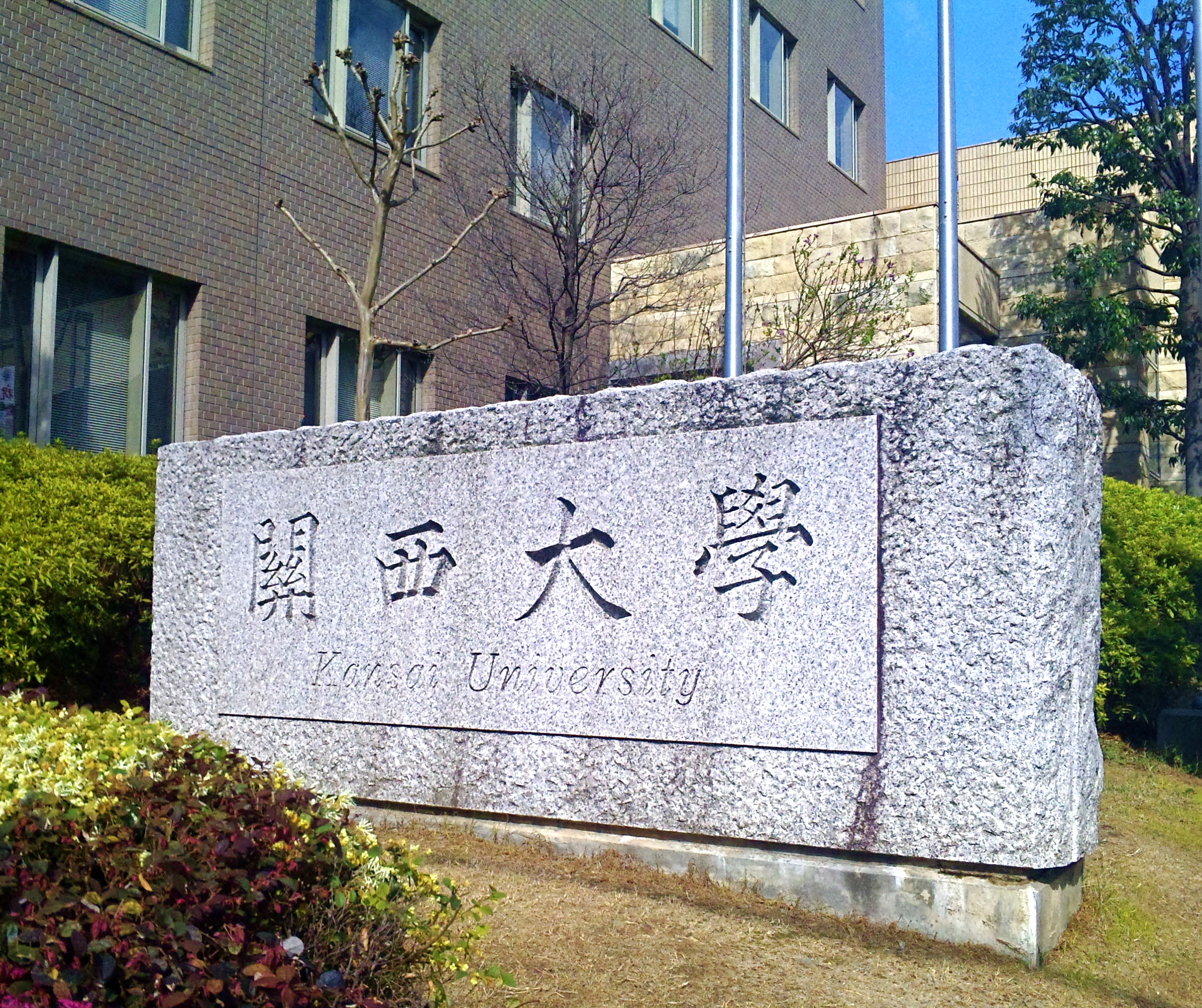 関西大学